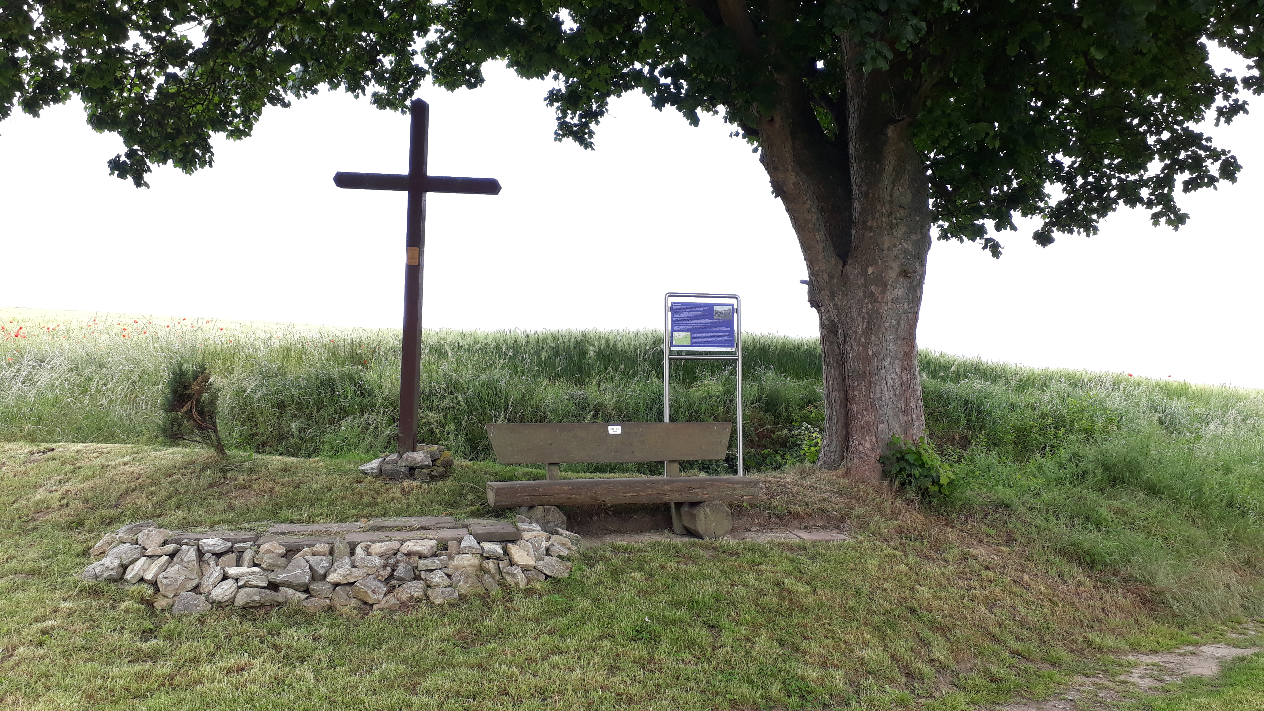 Die Mönchelieth oberhalb von Holtershausen mit Infotafel, Holzkreuz und Sitzbank. Hier finden regelmäßig Gottesdienste und Taufen statt.